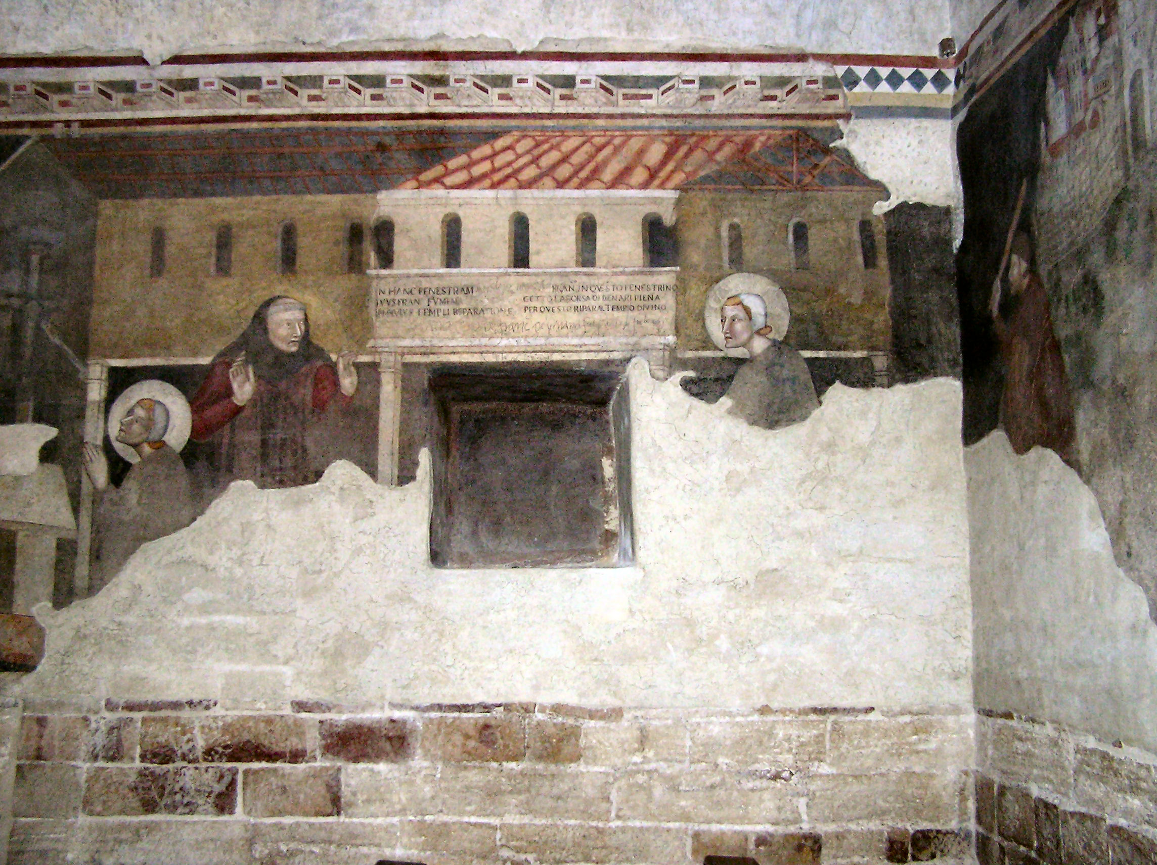 Fresko: Frans forsøger at give præsten ved San Damiano penge, men afvises og smider dem i vinduet.